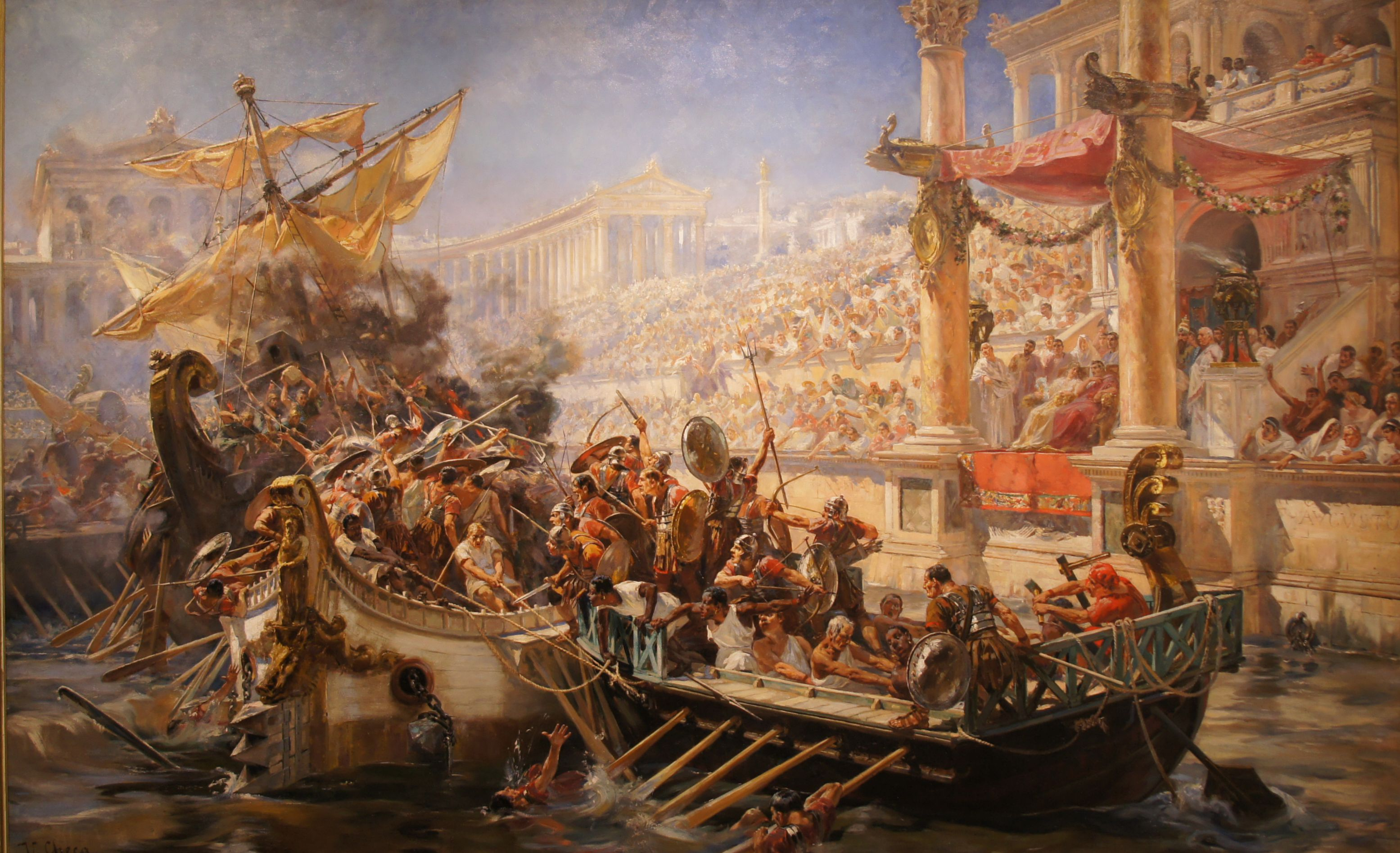 La naumaquia (combate naval entre romanos), óleo sobre lienzo, 125,6 x 200,5 cm. 1894. Firma ángulo inferior izquierdo. Esta obra fue presentada en la Sociedad Nacional de Bellas Artes de París, 1894 y obtuvo medalla de oro en la Exposición Internacional de Atlanta en 1895. "No hallo modo de pintar en mis toscos renglones toda la viveza, todo el movimiento el colorido y la brillantez que se observa en el animado conjunto del combate naval naumaquia llena de estilo y de sentimiento, en la que hallaría el señor Checa la base de su fama si esta no estuviese ya tan bien sentada".("El Nacional!, Madrid, 23 de abril de 1894). Museo Ulpiano Checa. Donación de los hijos del pintor, 1955.